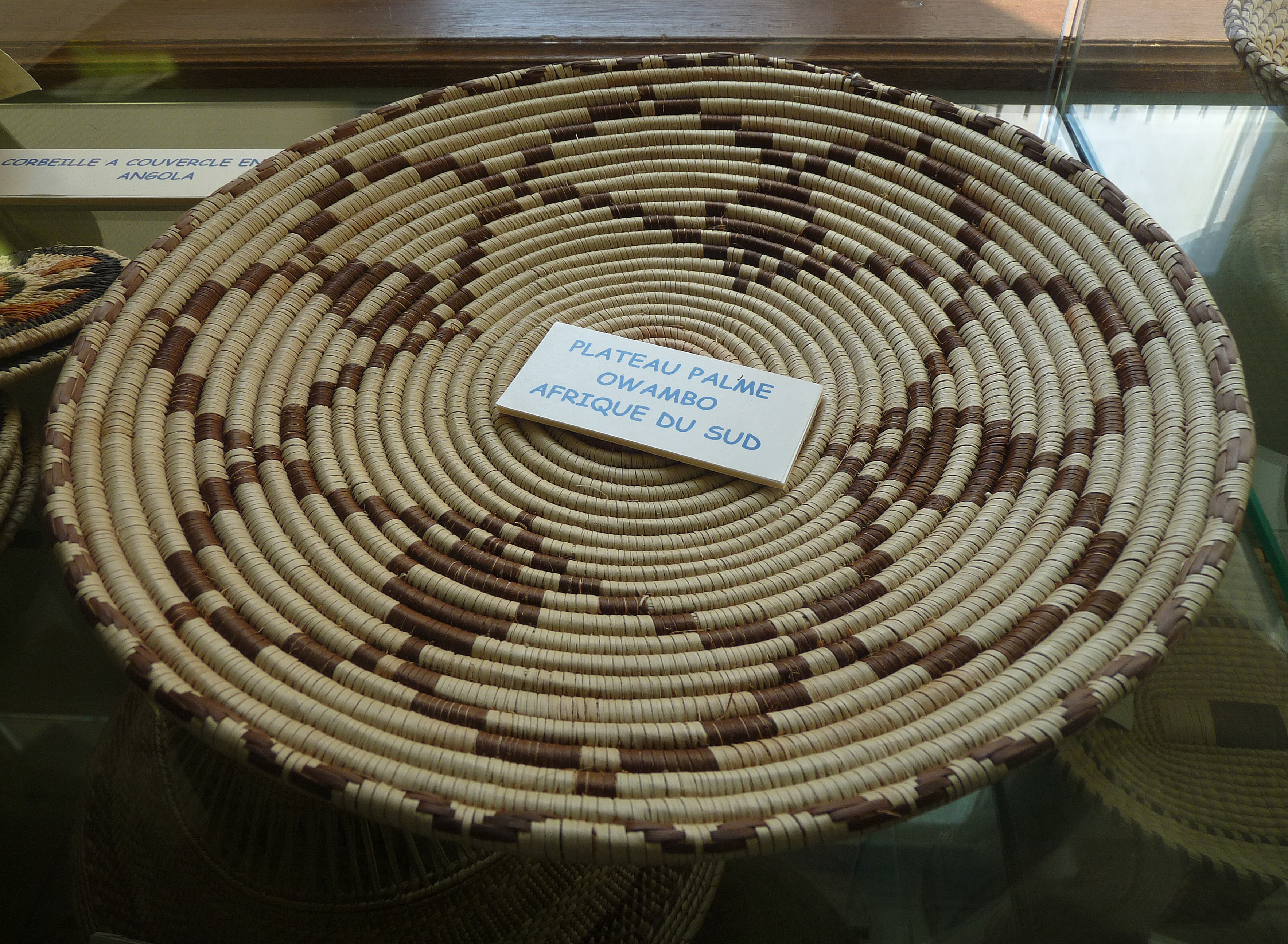 1Plateau de palme Ovambo exposé à la Maison de la Vannerie (Fayl-Billot, Haute-Marne)